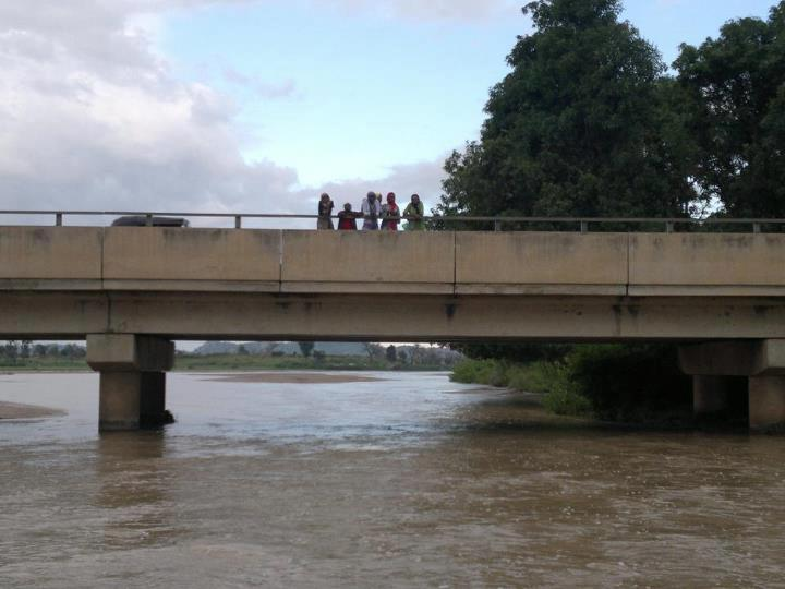 زالنجي صورة الكبري